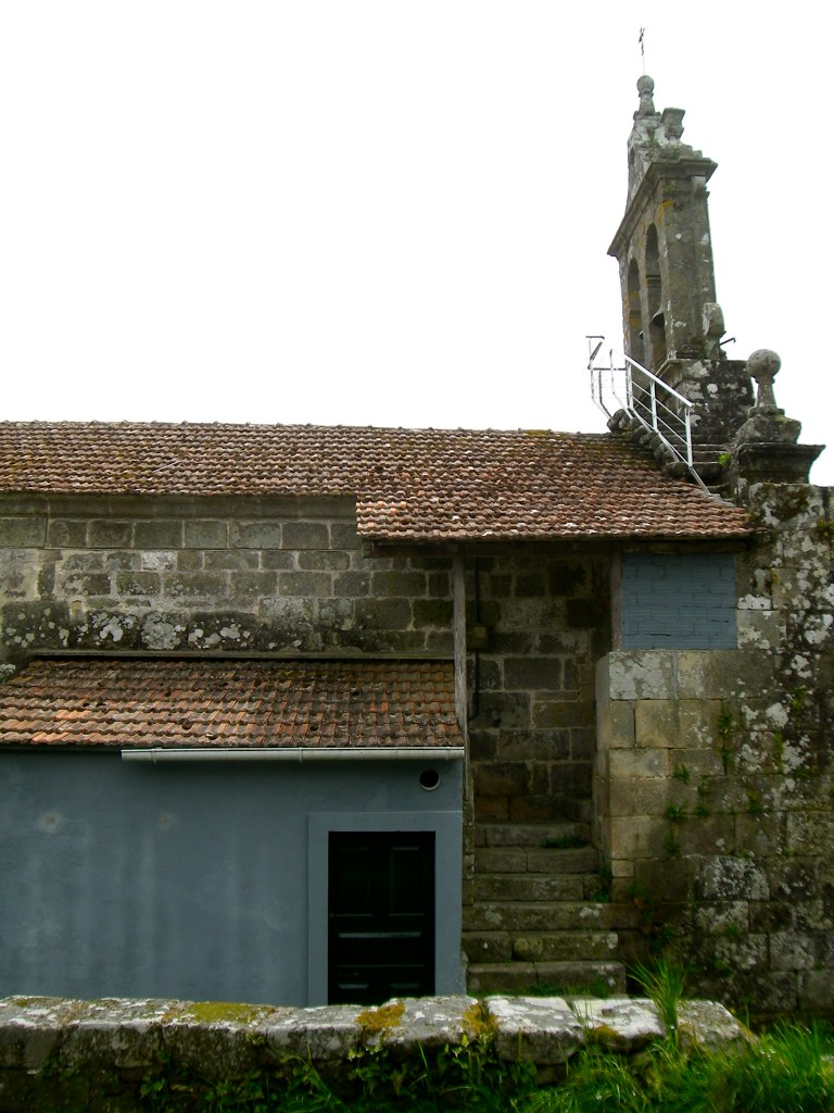 Espantallo na igrexa de Couselo